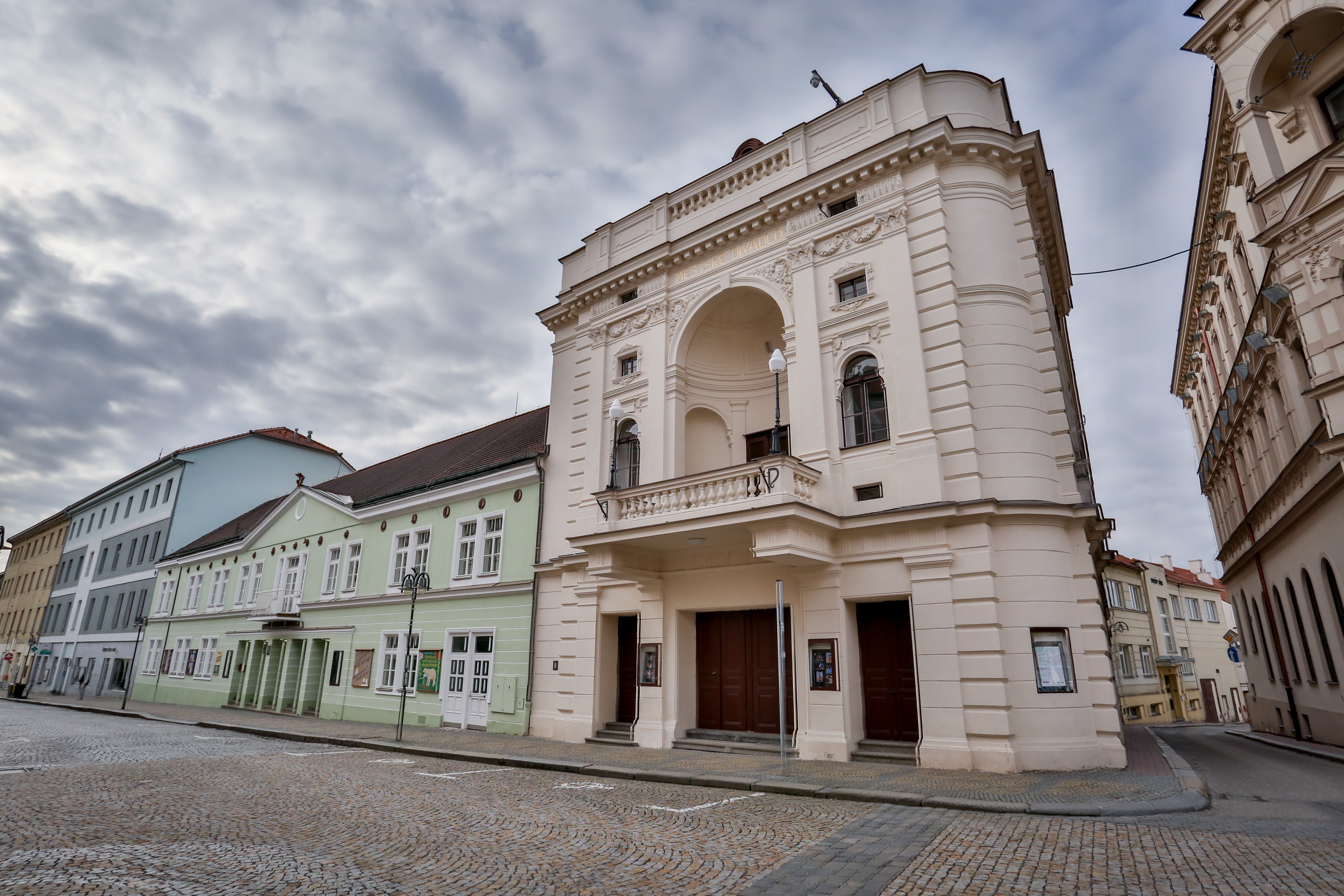 divadlo exteriér